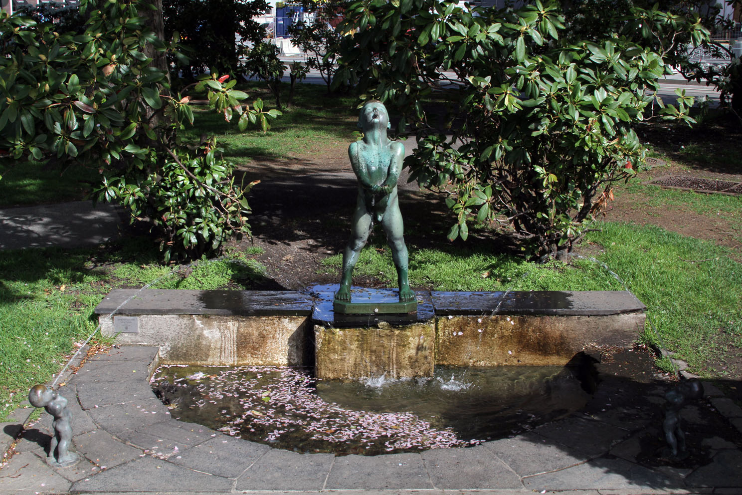 Sprøytegutten by artist Sofus Madsen, Byparken, Sentrum, Bergen, Hordaland, Norway